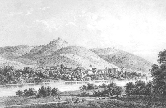 Untertürkheim mit Neckar und der königlichen Grabkapelle auf dem Württemberg